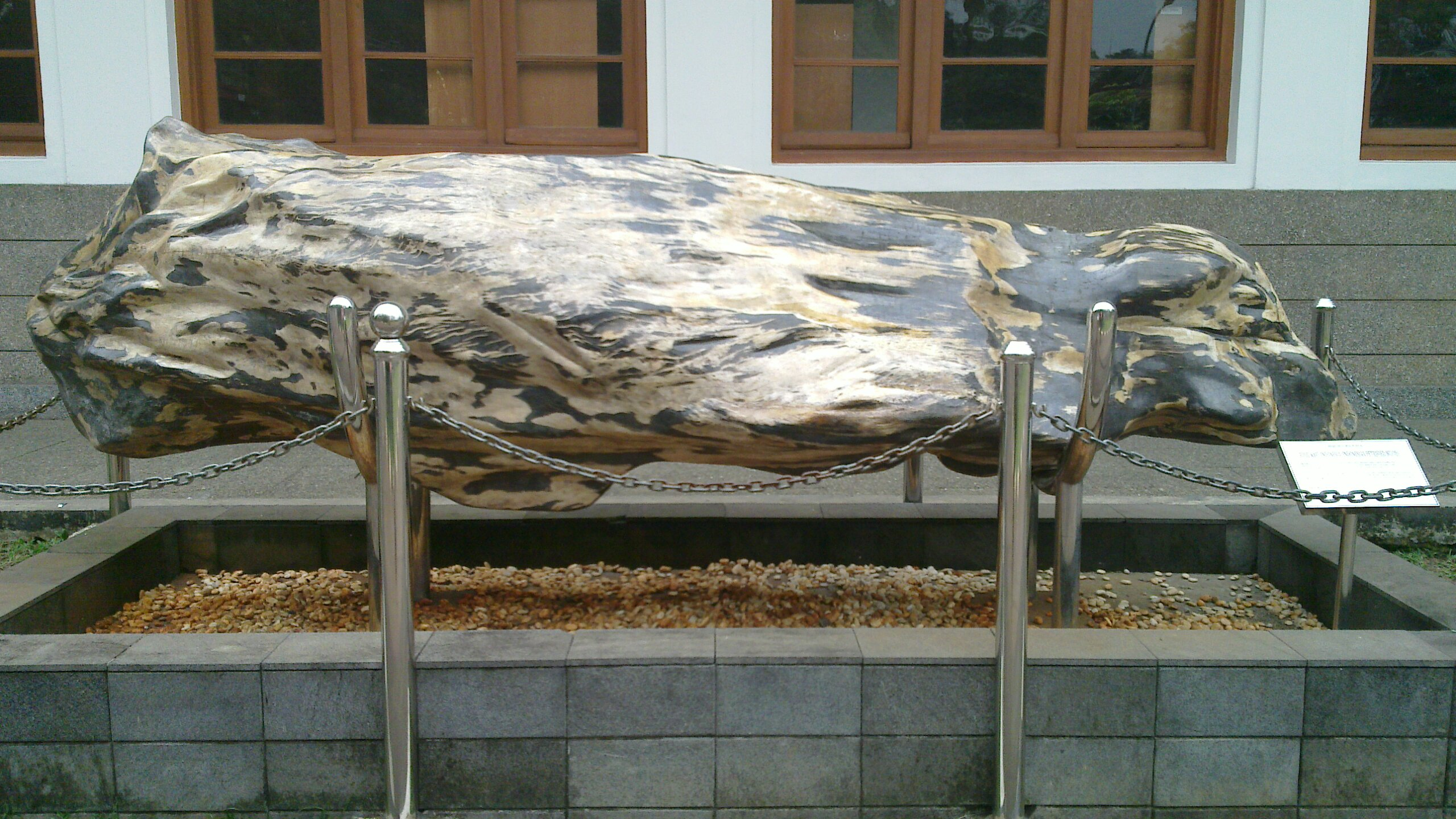 மரத்தின் புதைபடிவம், பண்டுங்